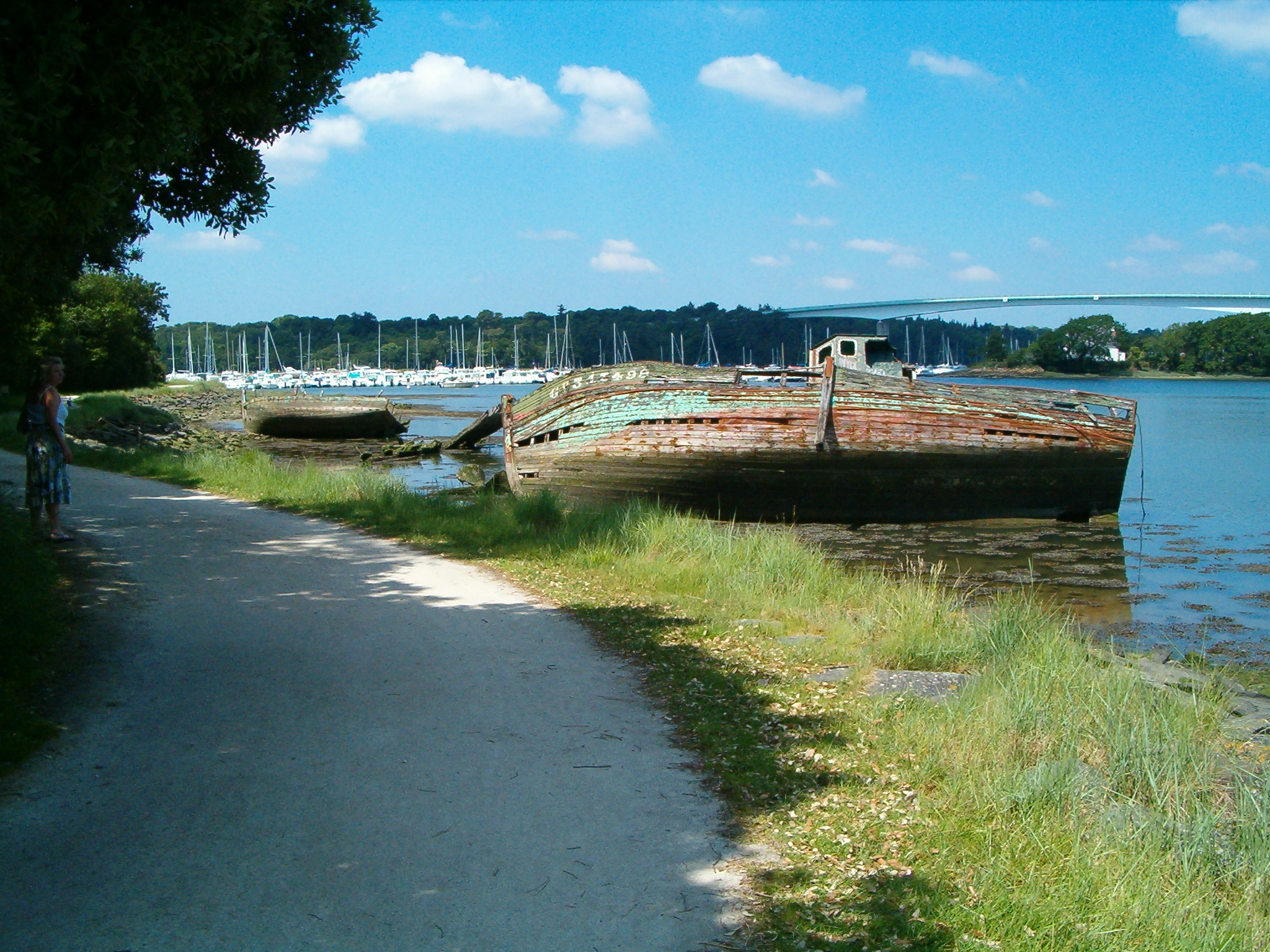 Épaves dans l'anse de Penfoul entre Bénodet et Clohars-Fouesnant. A l'arrière-plan le pont de Cornouaille et le port de plaisance de Bénodet.